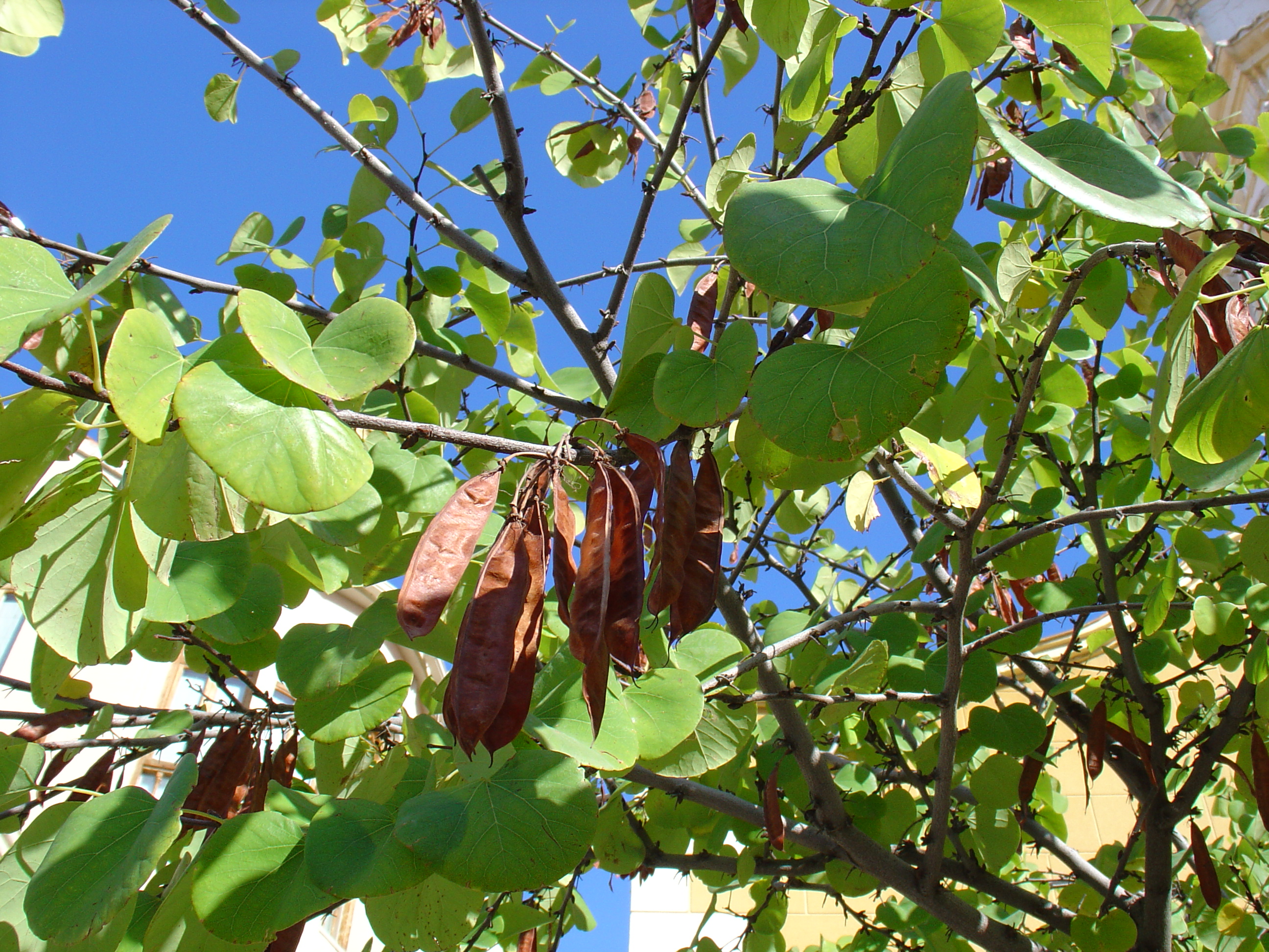 Cercis siliquastrum, árbol de Judea, árbol del amor. Enfatiza las hojas y el fruto.